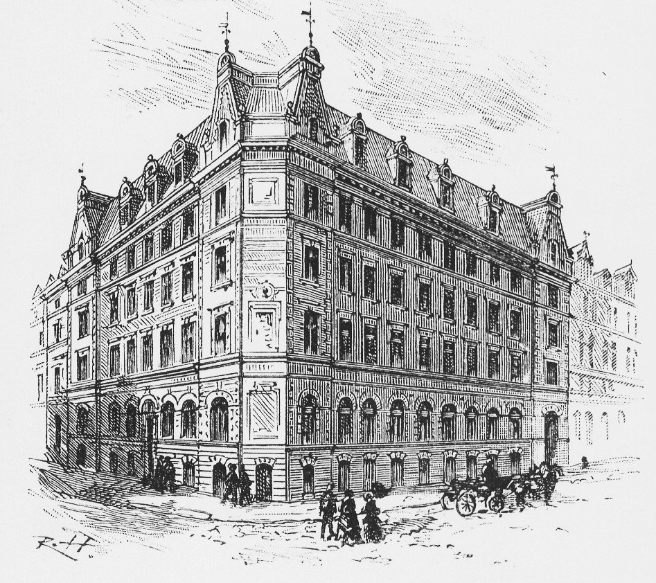 Aftonbladets redaktionshus i korsningen Stora Vattugatan / Klara Västra Kyrkogata 7 (kv Fyrfotan mindre). Arkitekter Magnus Isæus & Carl Sandahl. Byggmästare P. Sundahl